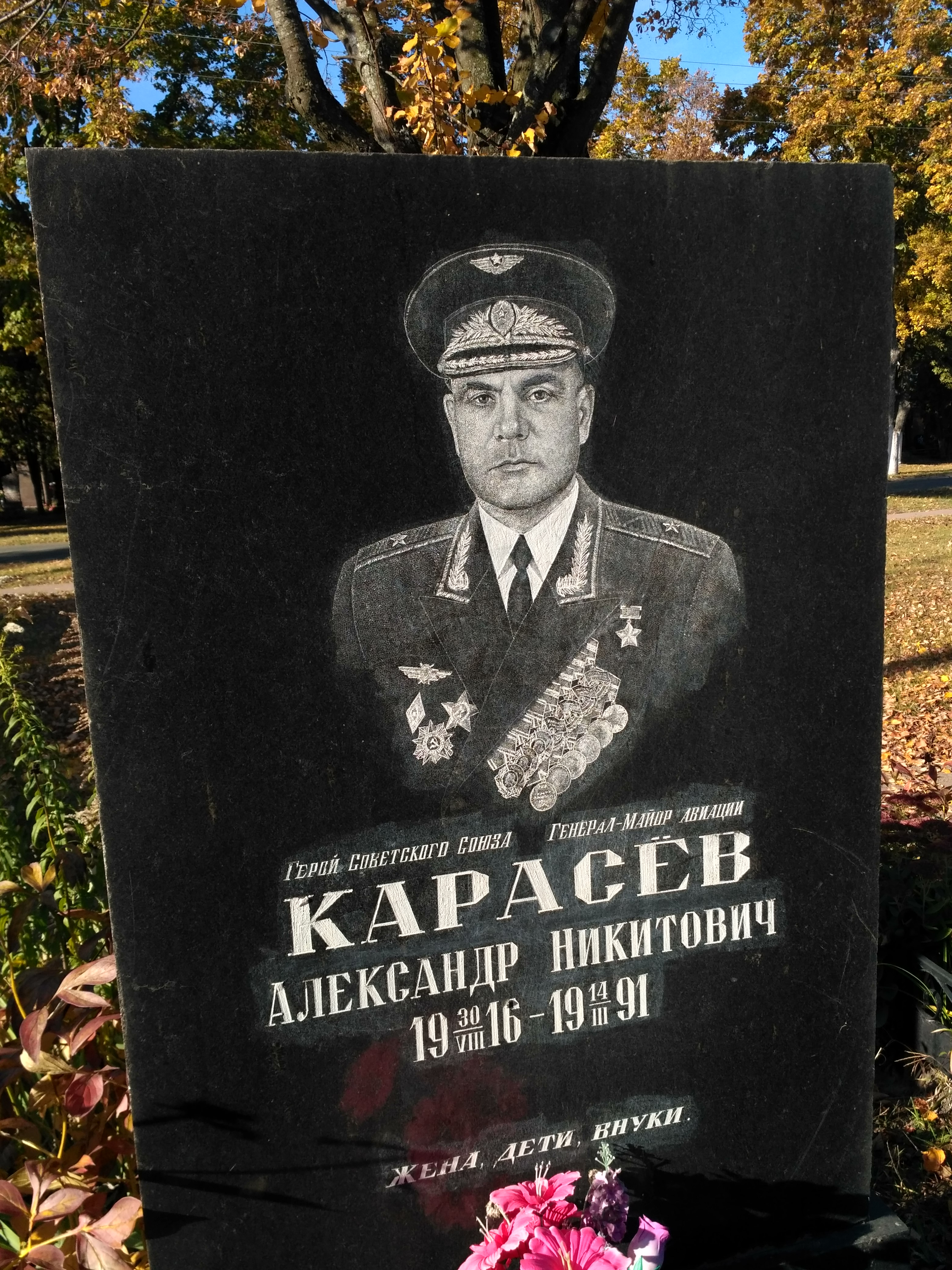 Могила генерал-майора авиации Героя Советского Союза Александра Карасёва.